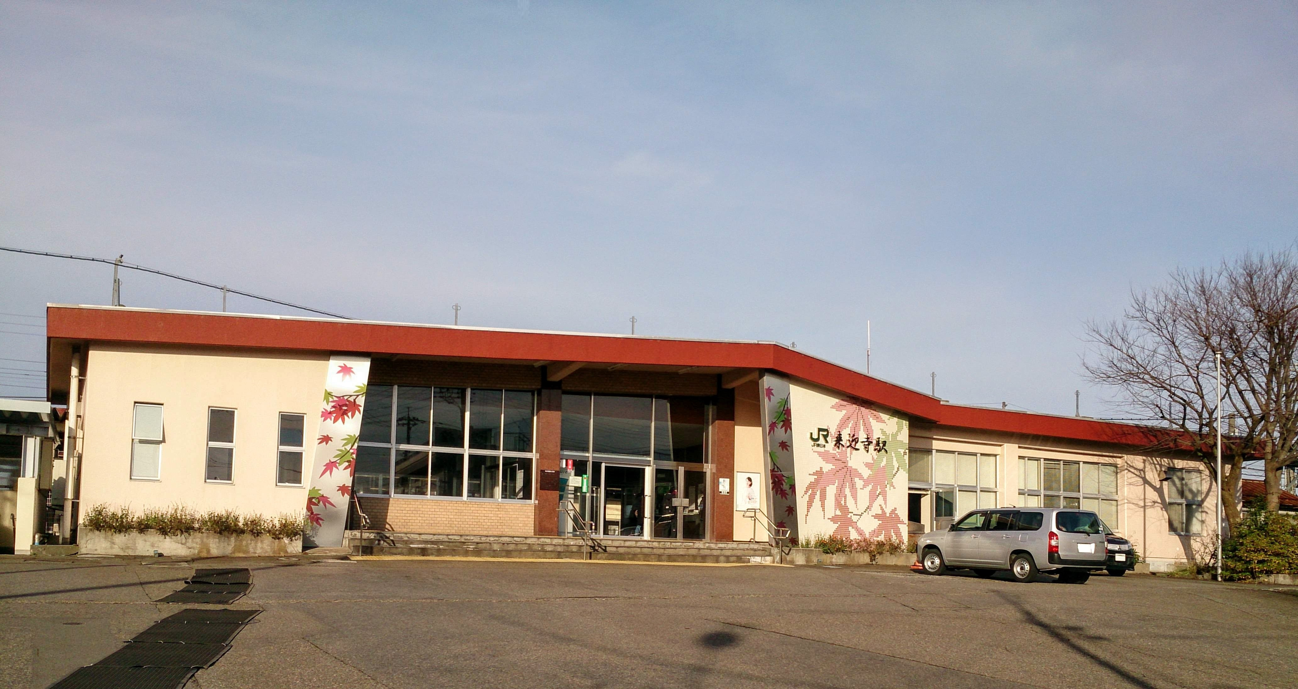 来迎寺駅のリニューアル後の駅舎（晴天時）